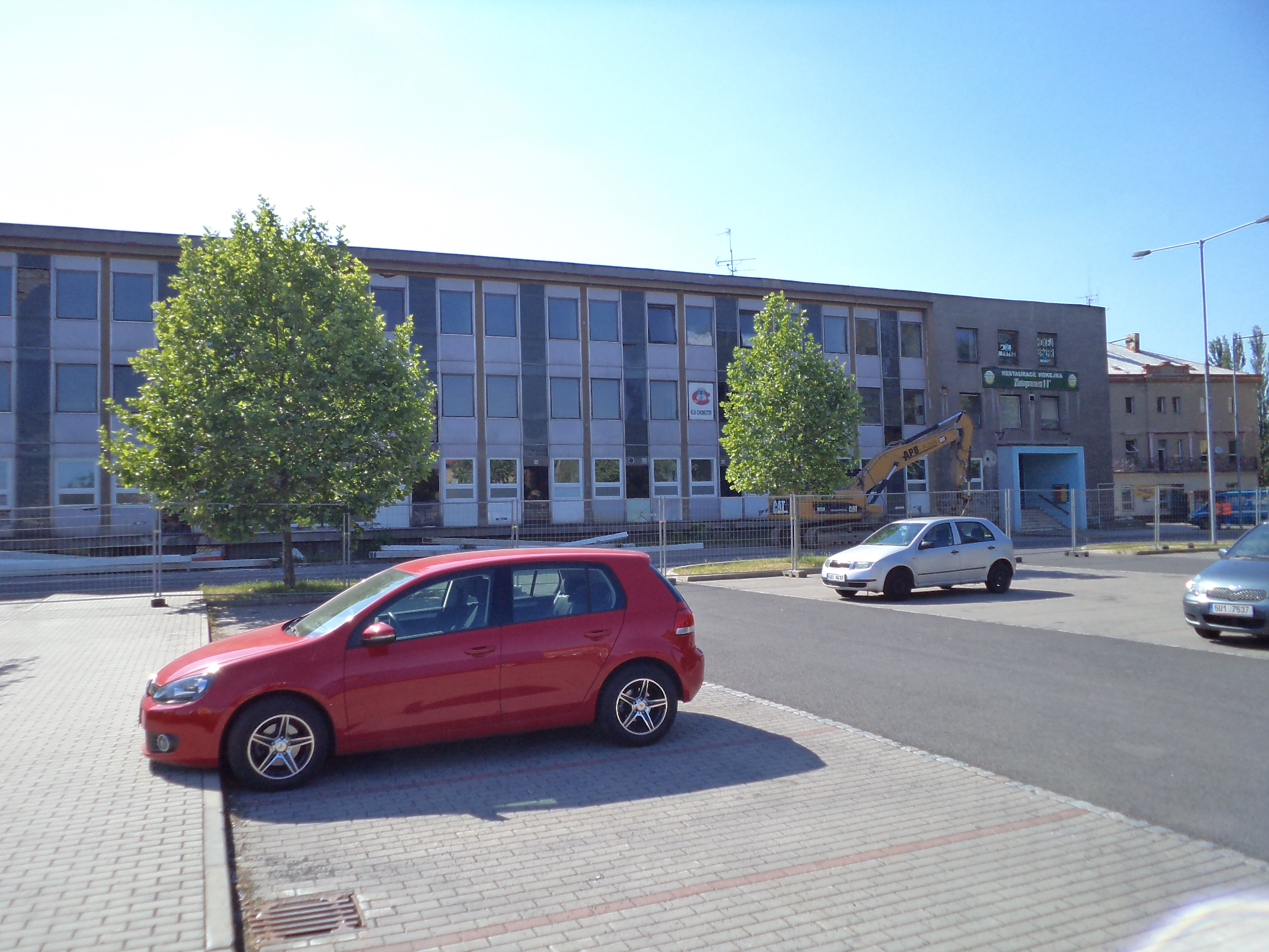 Chomutovský zimní stadion (Tolstého 4094?) na jaře 2011, krátce před demolicí